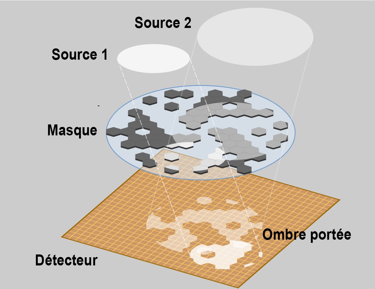 Schéma d'un télescope à masque codé avec deux sources éclairant le détecteur (légendes en français)